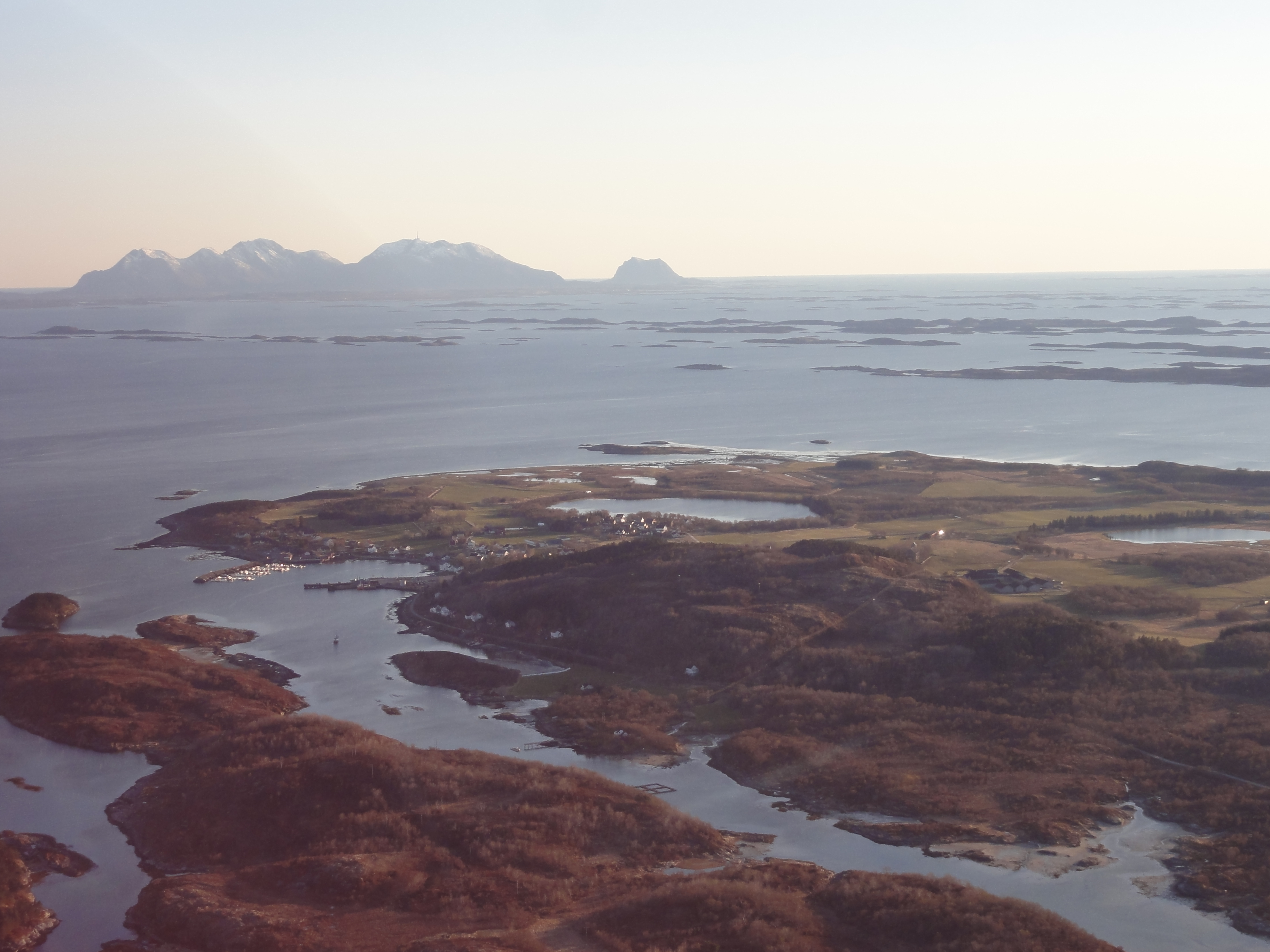 Tjøtta i Alstahaug kommune i Helgeland i Nordland. I det fjerne sees øya Vega.